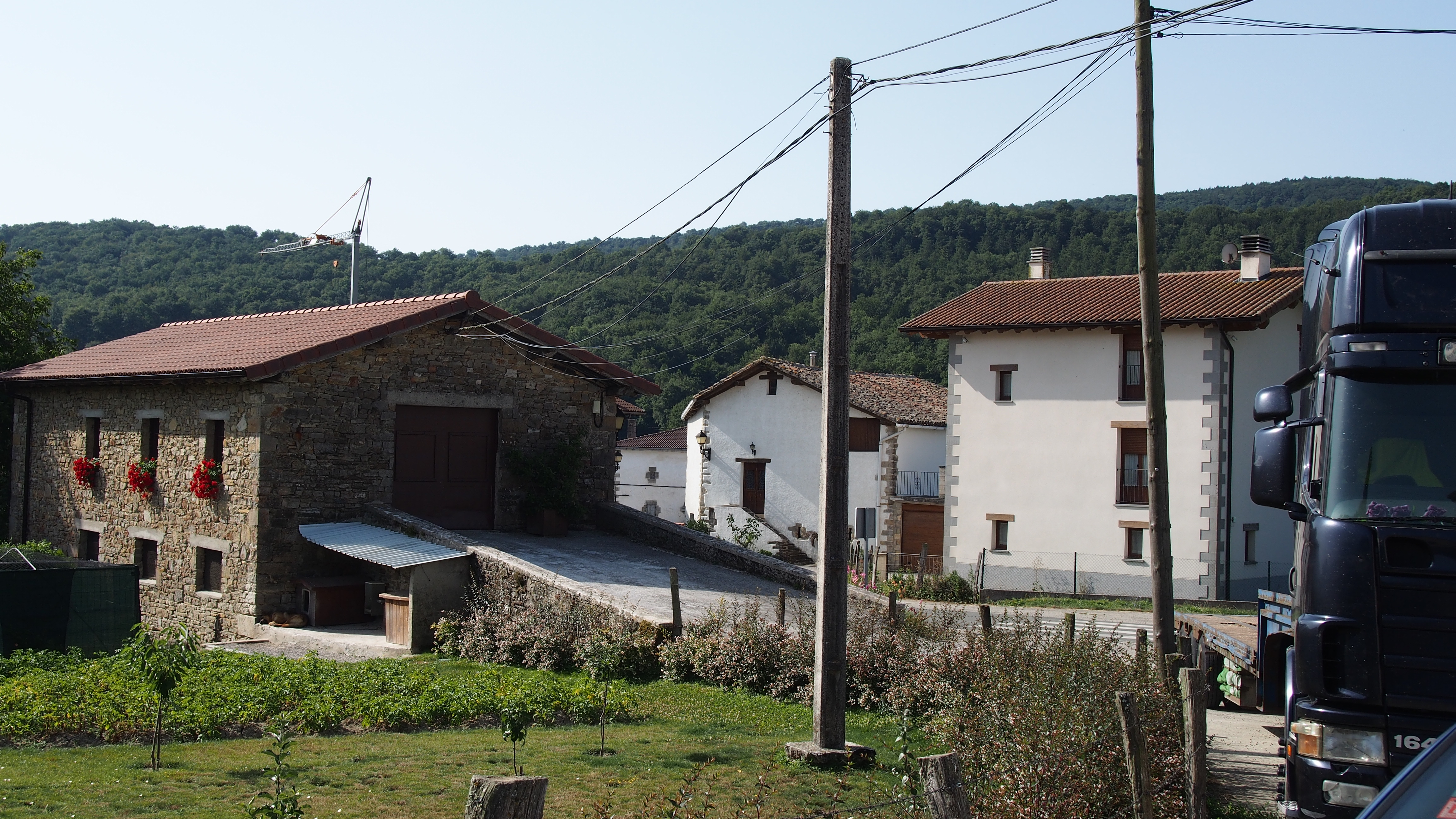 Nafarroako Eritze herriko etxeak